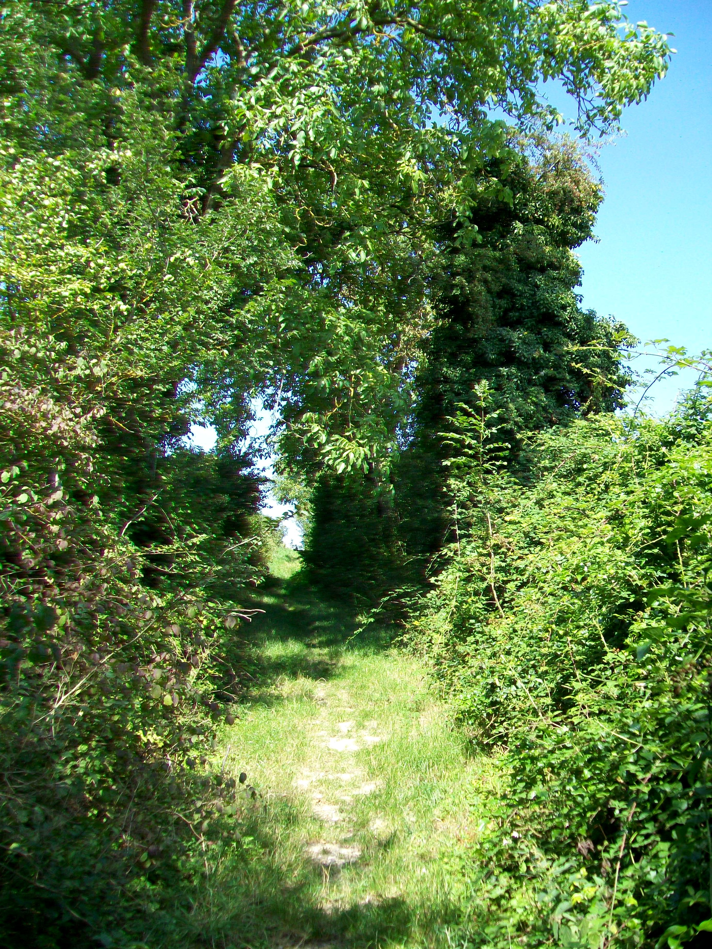 Le chemin rural n° 41 (GR 1a) dit de la cavée du dieu de Pitié.